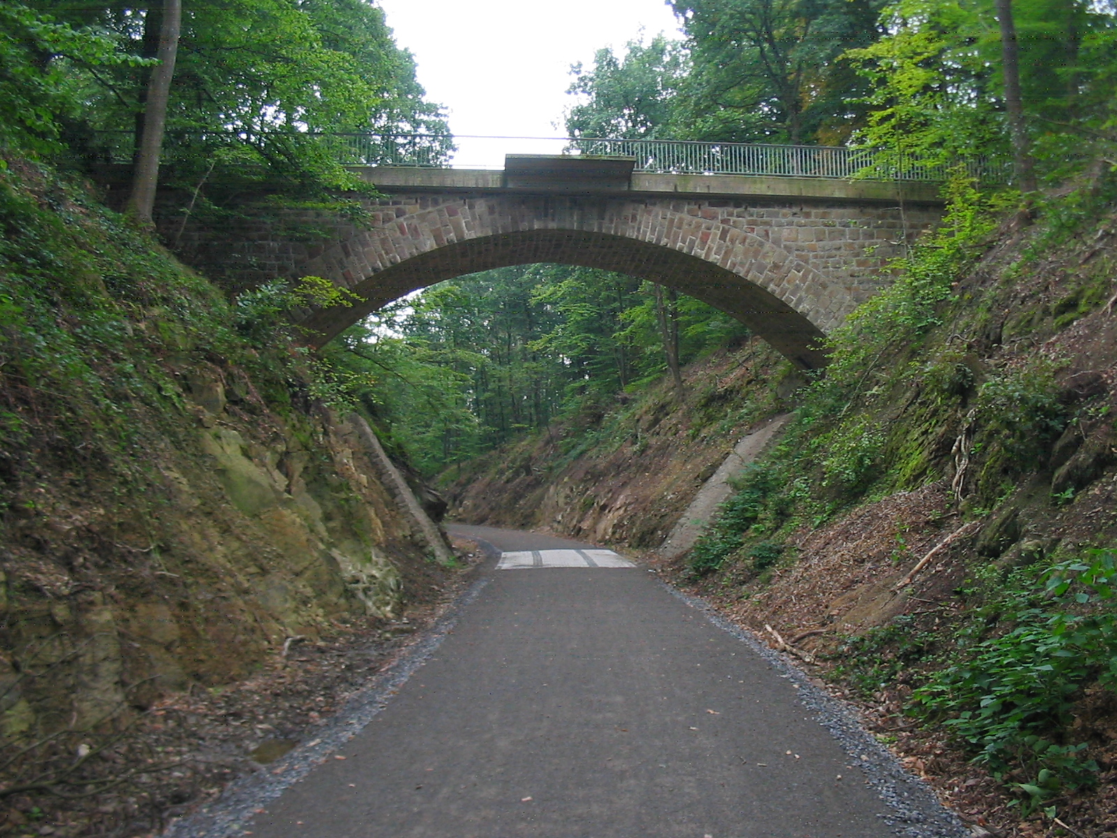 neuer Radweg in Wuppertal vom Zoo nach Cronenberg auf der Strecke der ehemaligen Burgholzbahn, hier auf Höhe der Kaisereiche